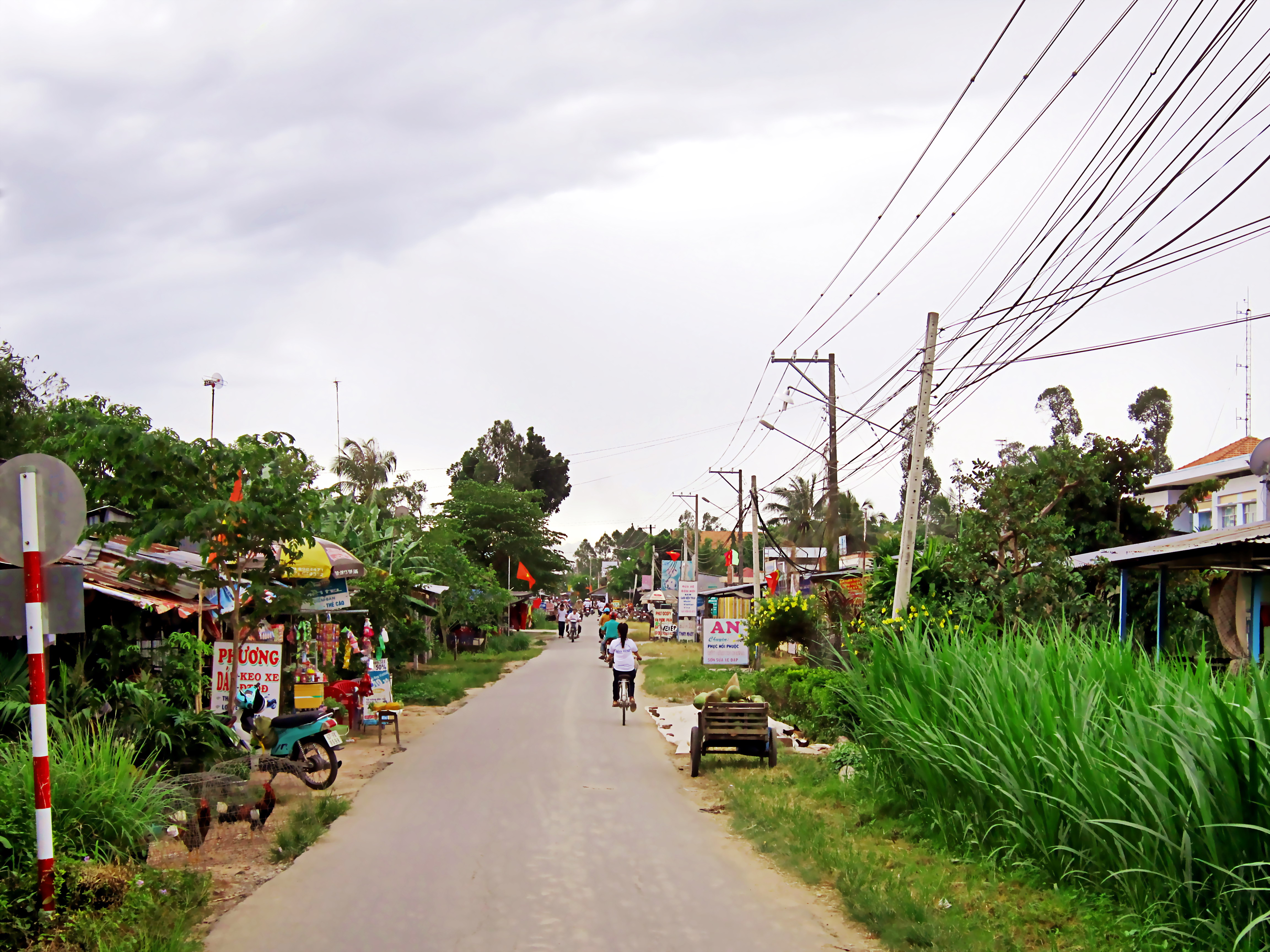 Trên Hương lộ 1, phía trước là khu vực Ủy ban và chợ xã Hòa Bình, thuộc huyện Chợ Mới, tỉnh An Giang, Việt Nam.